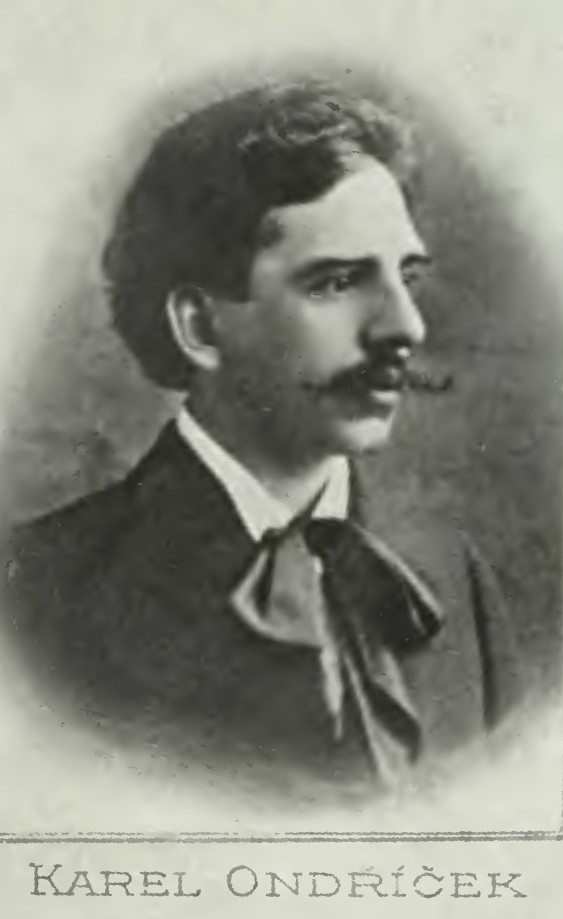 Portrét – Karel Ondříček (1863 - 1943), Český houslový virtuos.